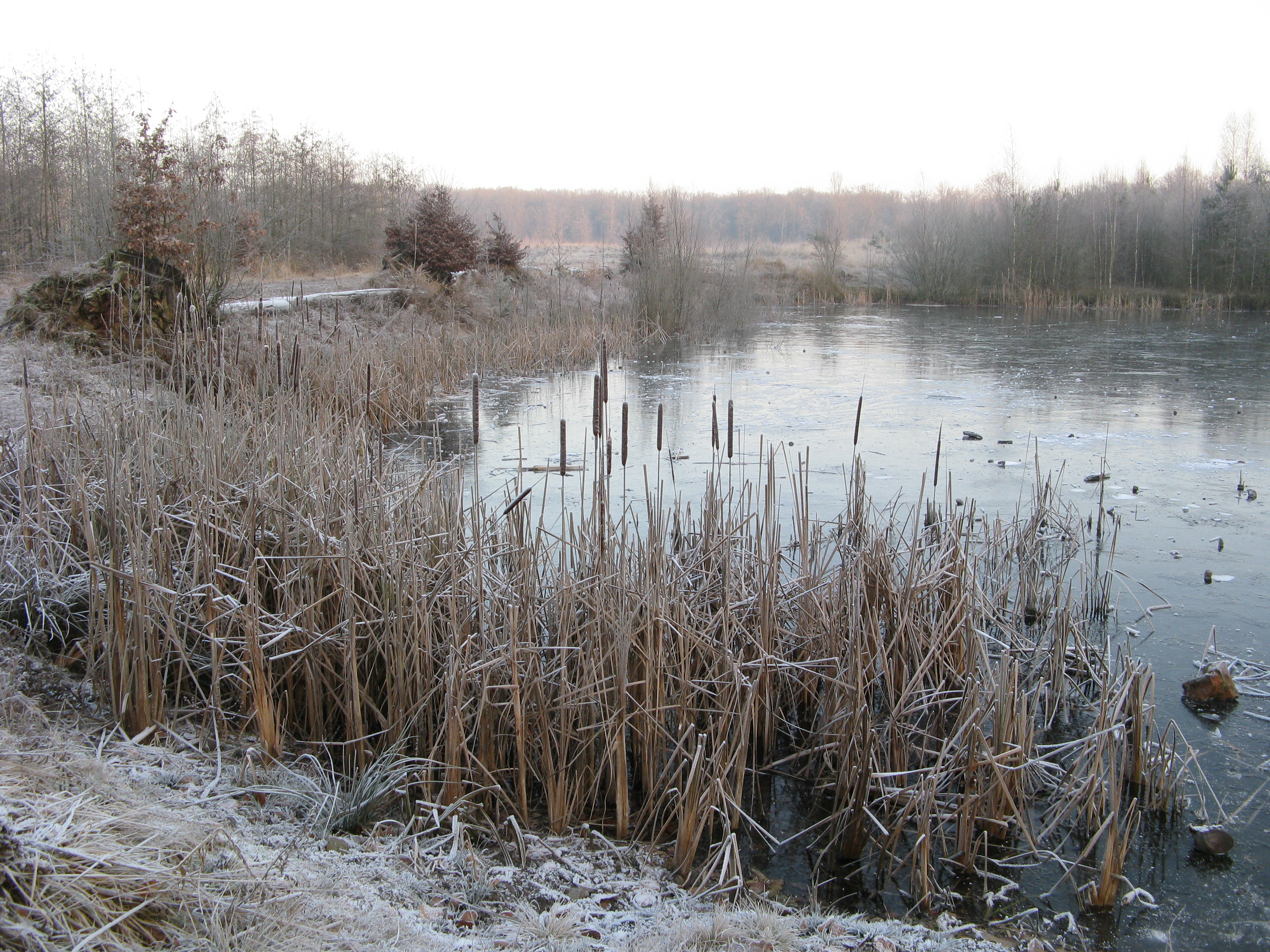 Weiher im Naturschutzgebiet Kohbrink bei Minden und Petershagen in Nordrhein-Westfalen.